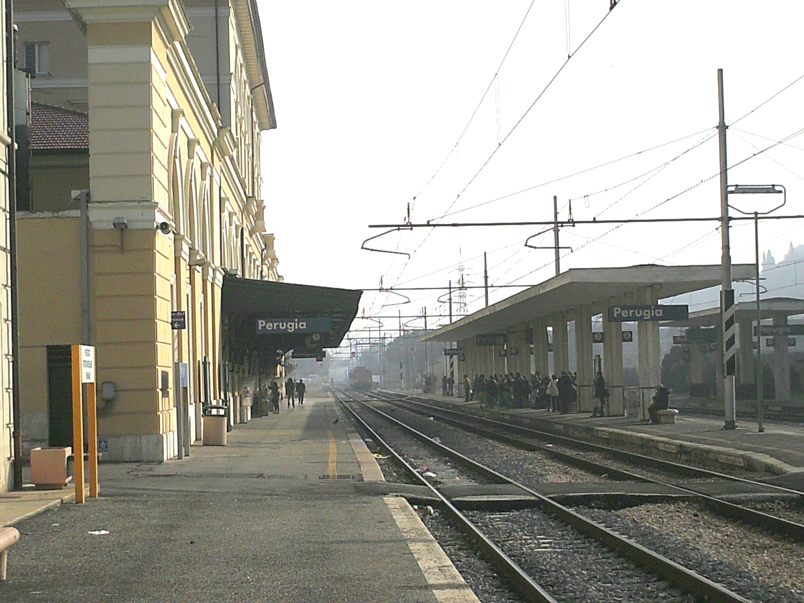 Perugia, Stazione. Foto di user:Grifomaniacs, 2 dicembre 2006.